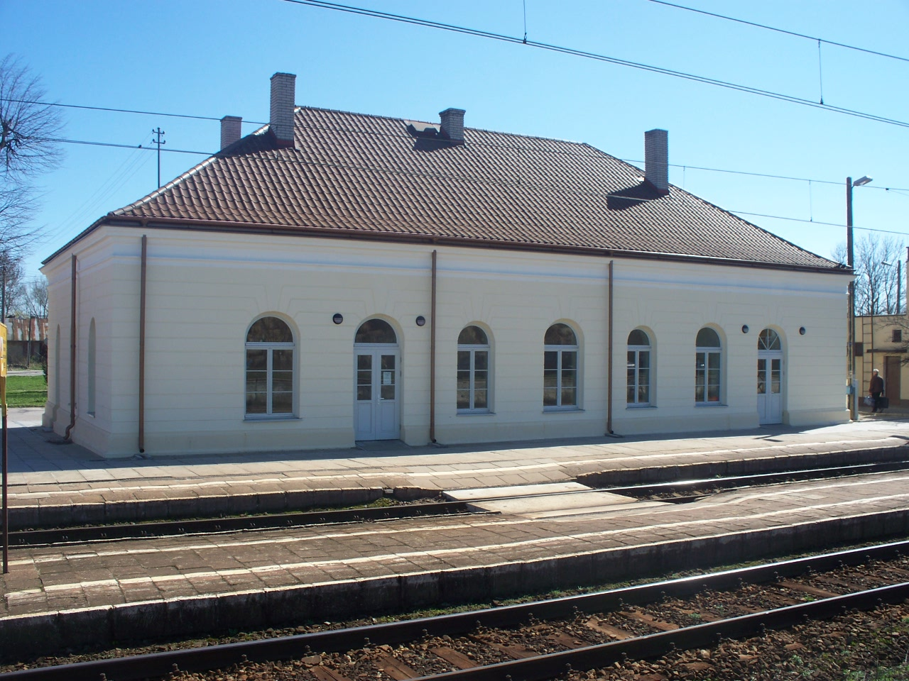 Dworzec kolejowy w Czyżewie został zbudowany w latach 1859-1862 ale najprawdopodobniej było to rok 1861. W czasie budowy kolei na terenie obecnej gminy Czyżew sprawował pieczę Nadzorca Sekcji V Czyżew Drogi Żelaznej St. Petersbursko –Warszawskiej. W 2010 r. budynek ten został odrestaurowany przy współpracy gminy Czyżew oraz PKP Oddziałem Nieruchomości w Warszawie. I na obecną chwilę jest piękną wizytówką miejscowości.